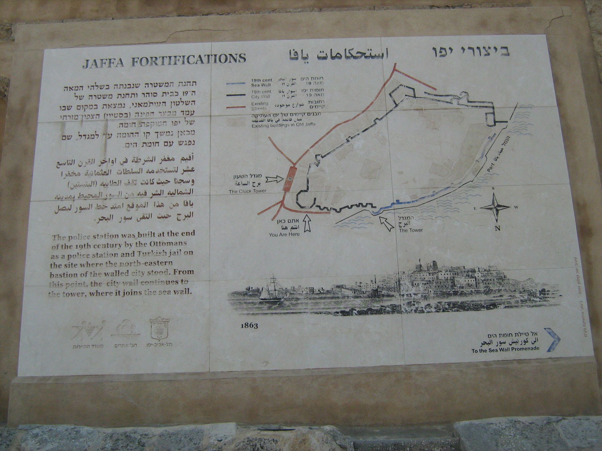 מפת ביצורי יפו העתיקה על חומות יחפו